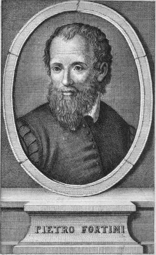 Pietro Fortini